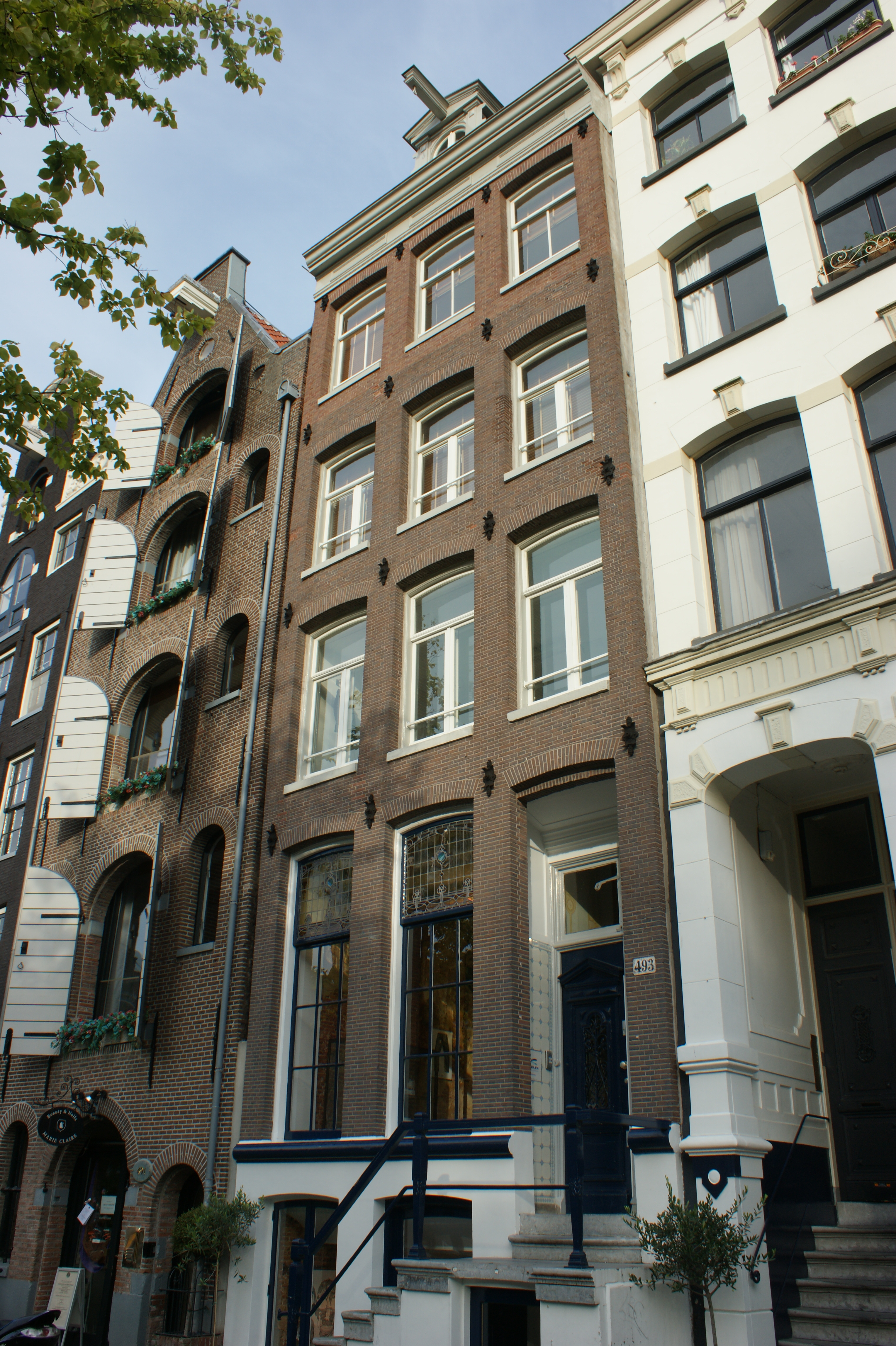 Amsterdam, Prinsengracht 493. Tijdens de Tweede Wereldoorlog bolwerk van het protestants-christelijk verzet, waar de eerste nummers van het illegale verzetspamflet Oranje-bode (later getiteld Trouw) werden gemaakt.